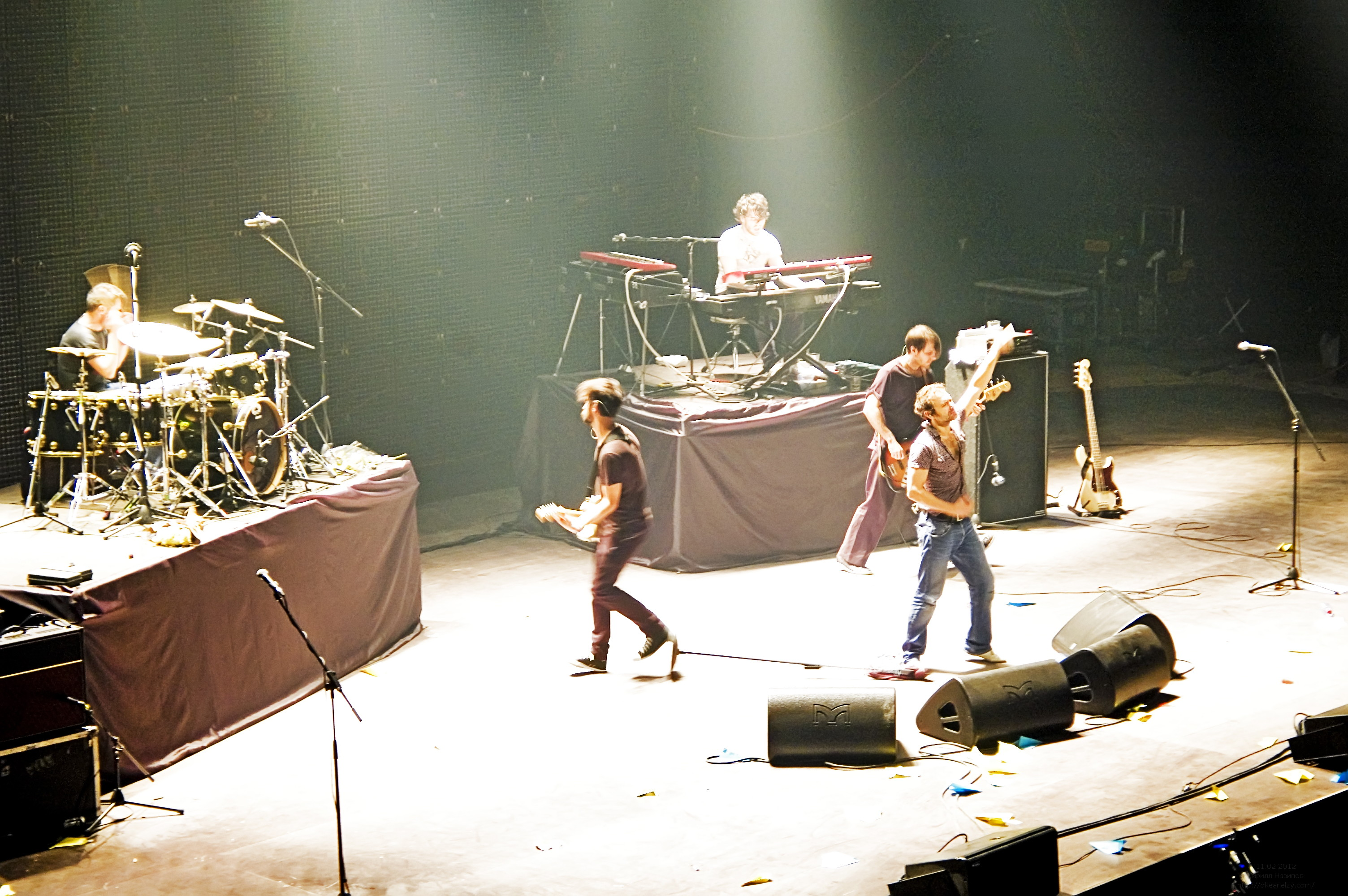 Концерт у Москві. 11 лютого 2012 року. Відкриття клубу "Stadium Live".